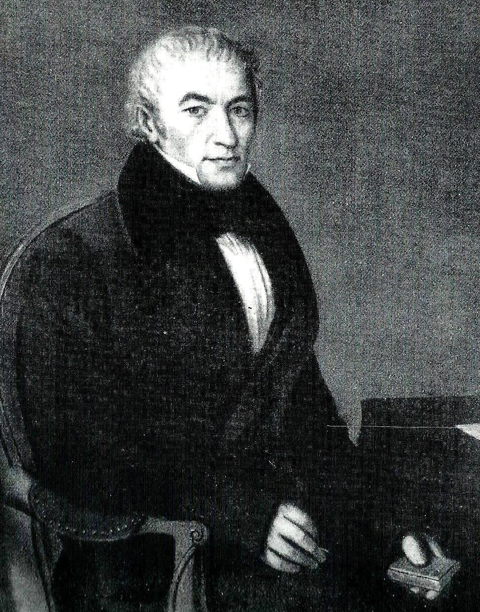 Porträt-Gemälde des Beigeordneten Bürgermeisters Johann Christian Oeder